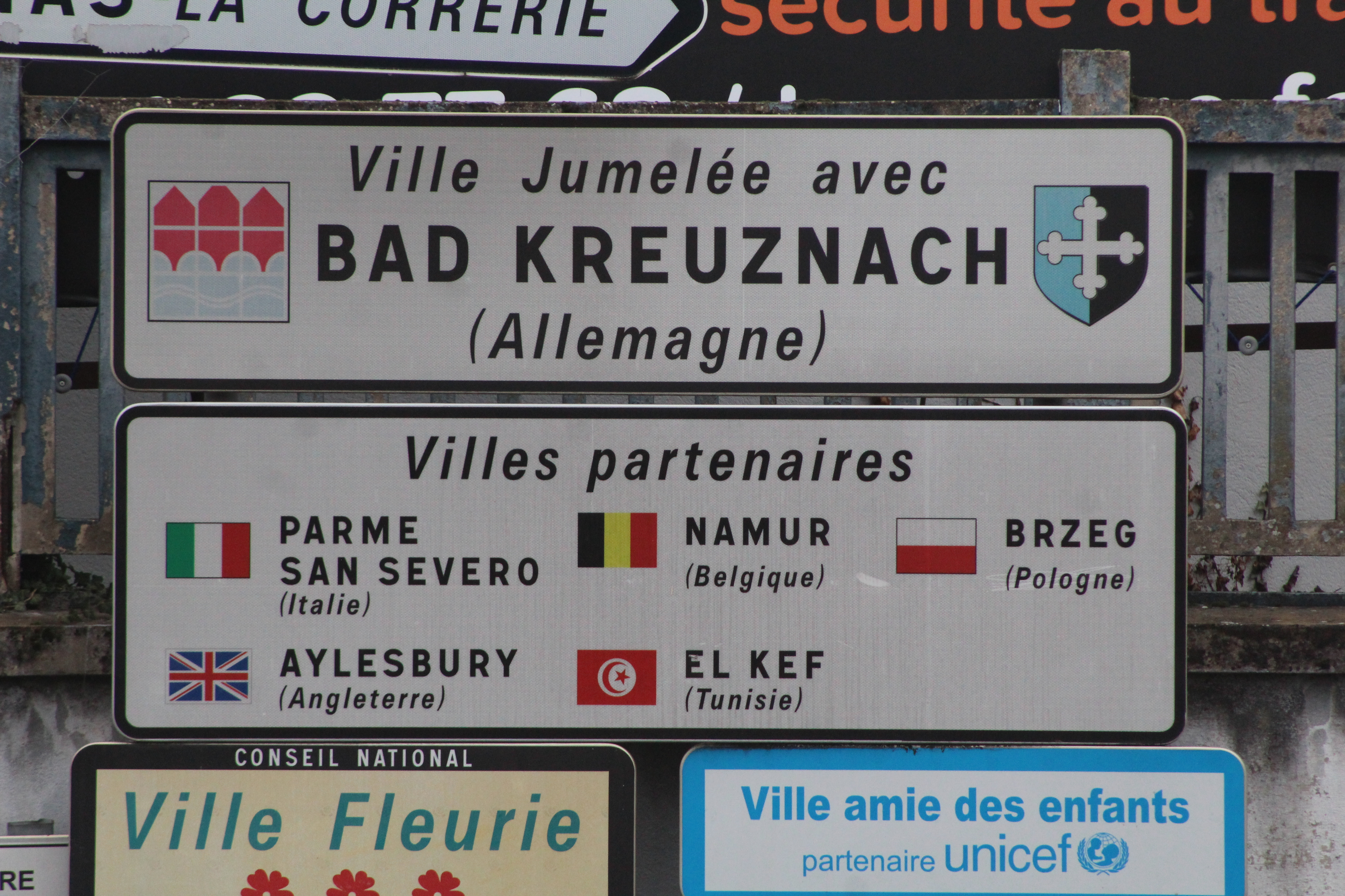 Panneau indiquant les villes jumelées ou partenaires avec Bourg-en-Bresse.